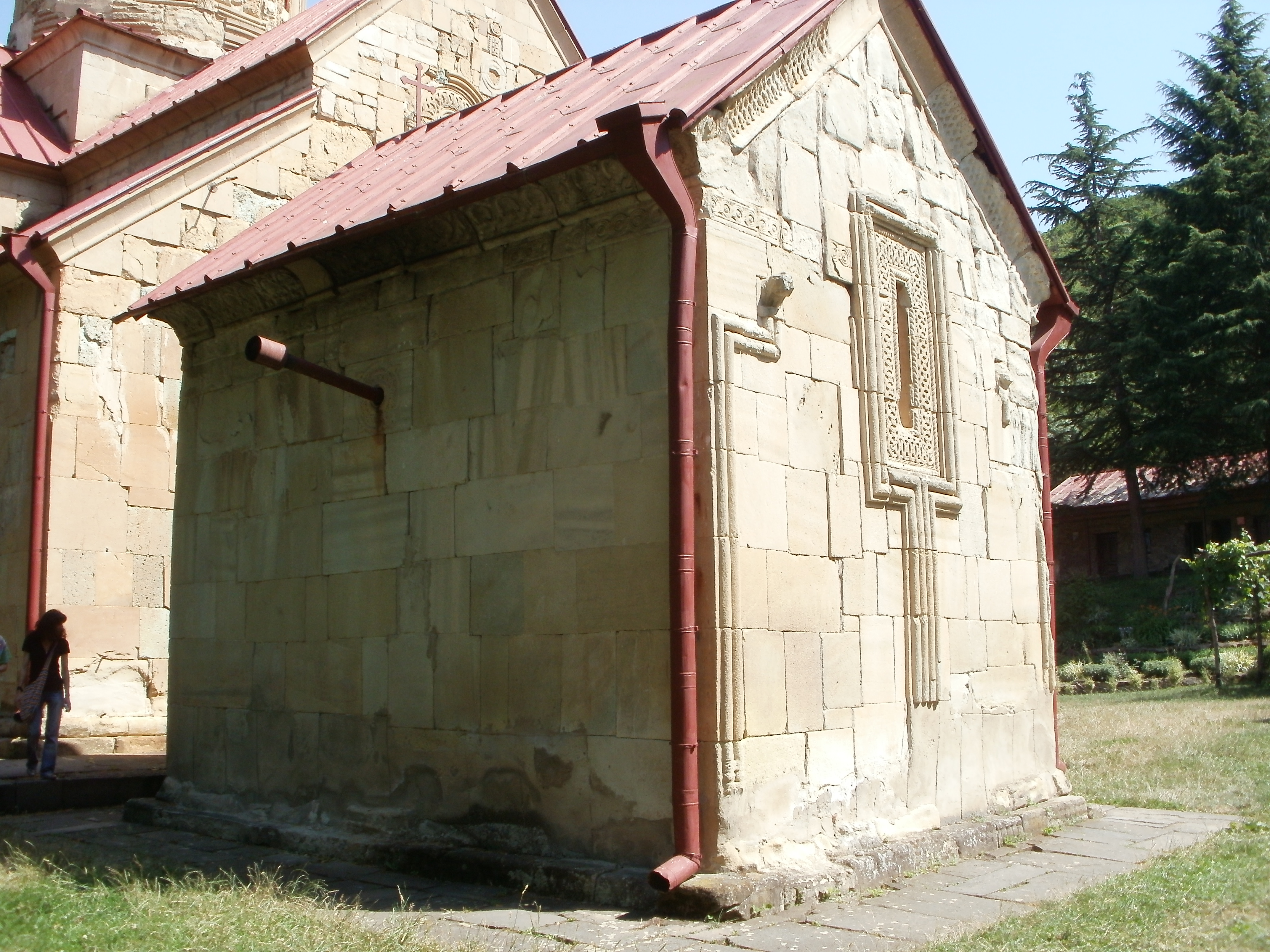 წმინდა გიორგის დარბაზული ეკლესია ბეთანიის მონასტრის ეზოში. 1196 წ.